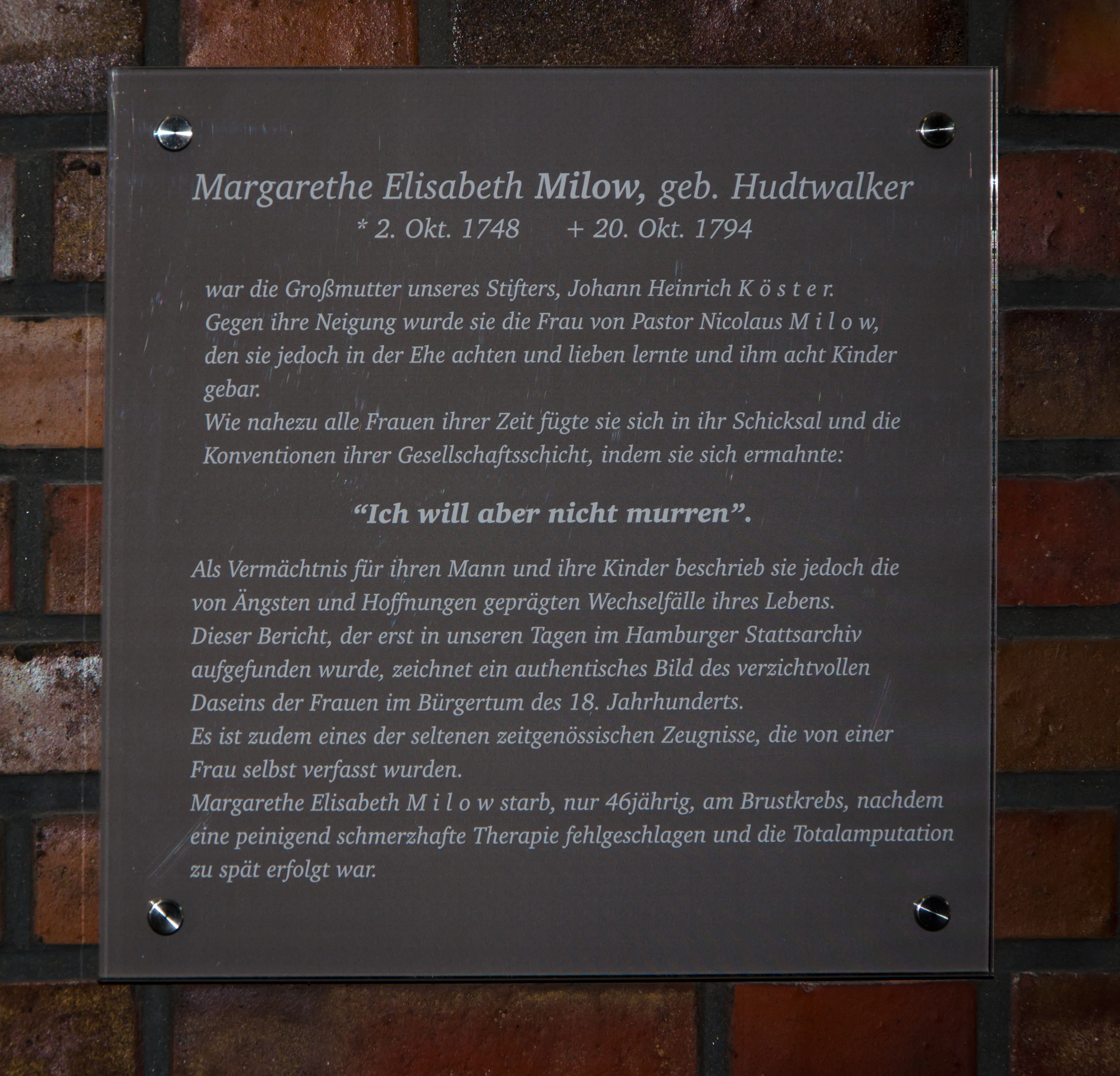 Köster-Stiftung Tafel für Margarethe Elisabeth Milow